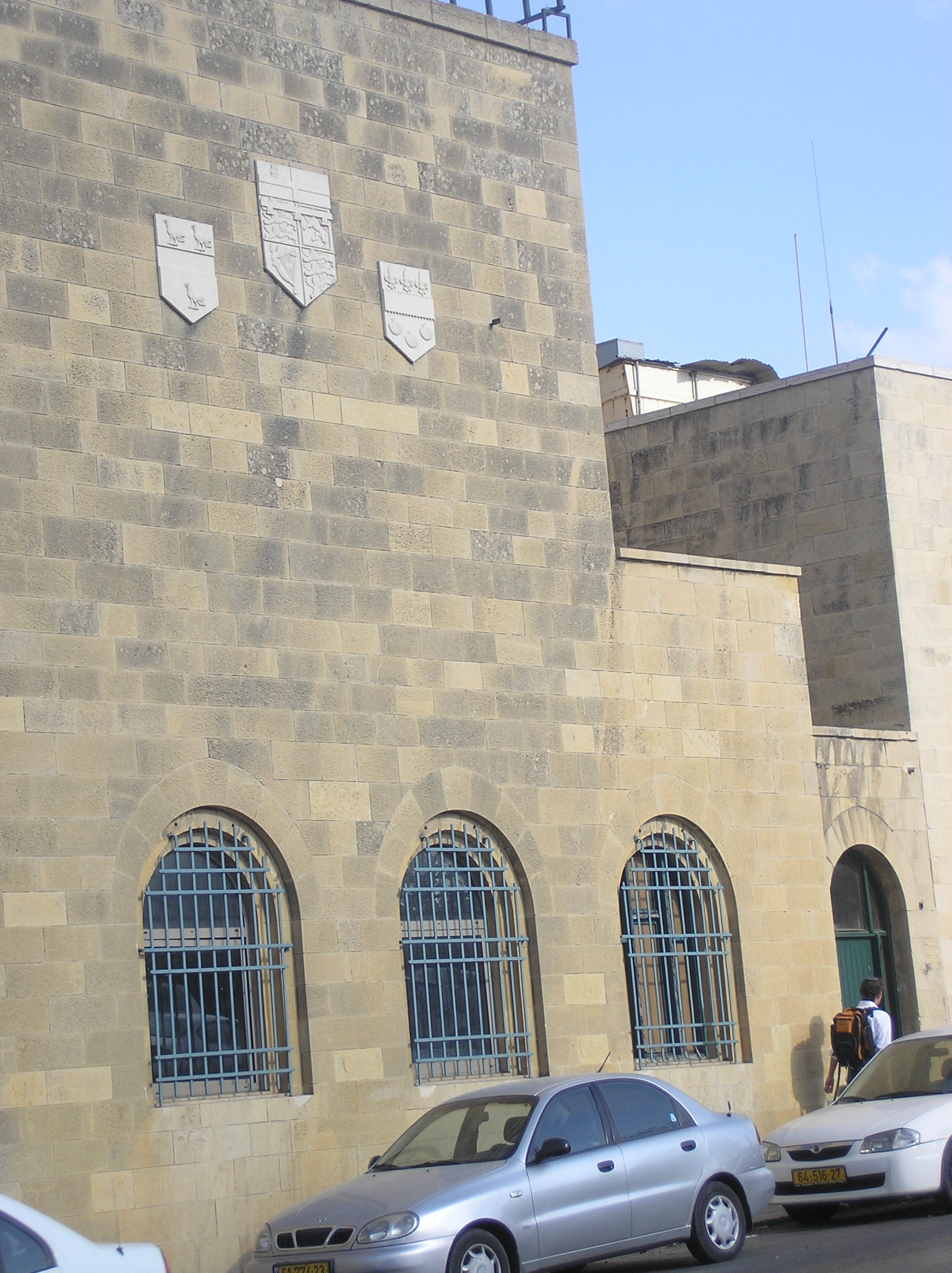 Mount Zion Hotel